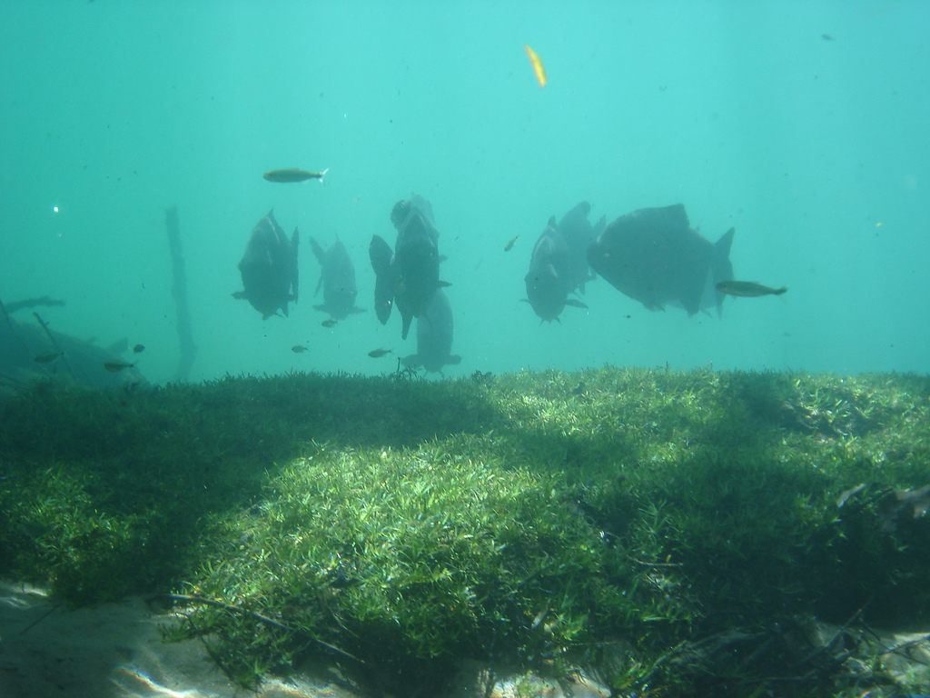 Mergulho (Piaractus mesopotamicus) em Bonito.